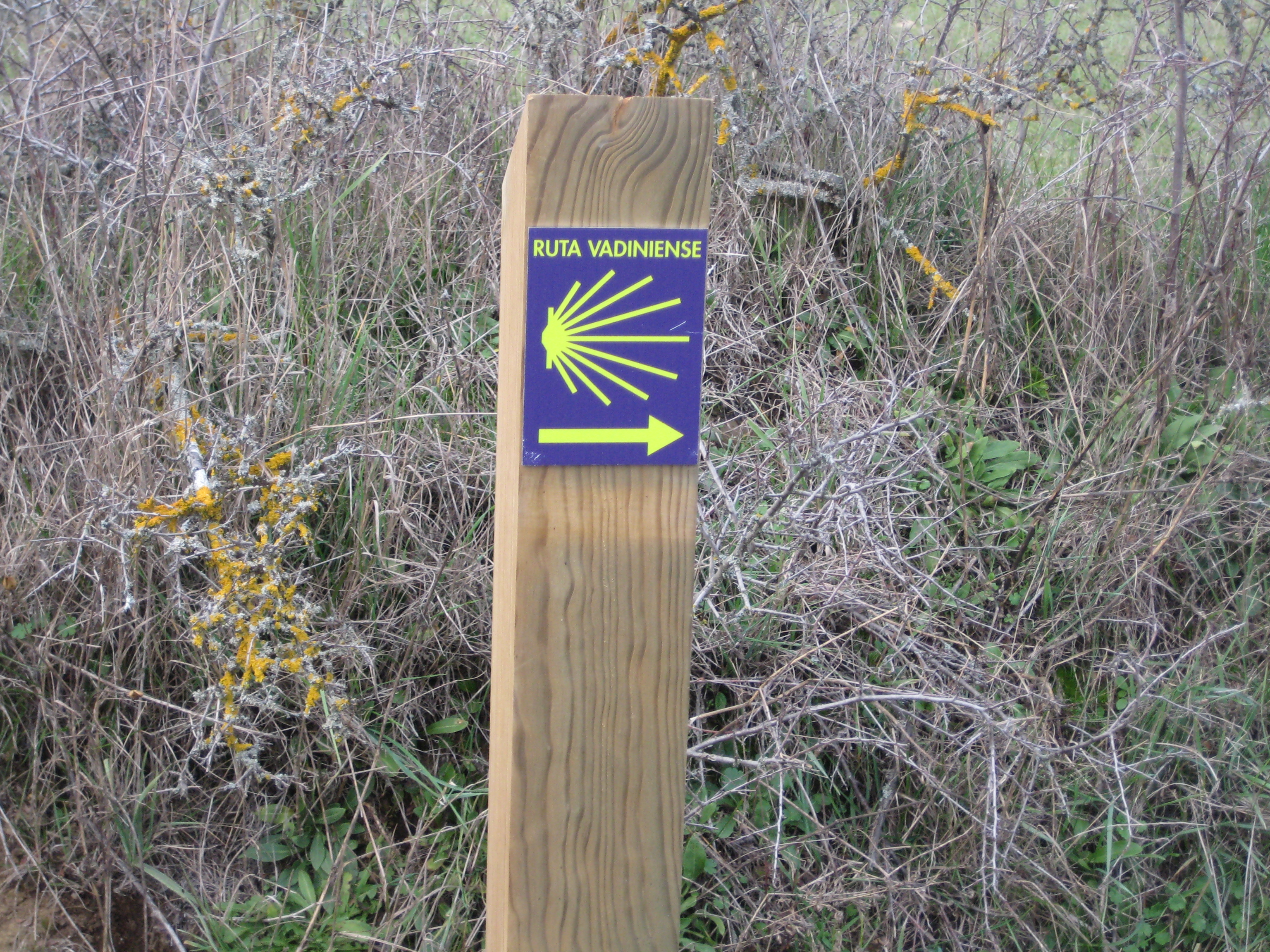 Cartel ruta Vadiniense altura cementerio